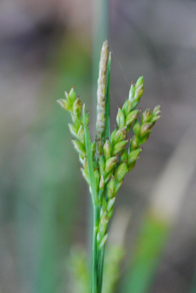 Carex tristachya Moegisuge モエギスゲ（カヤツリグサ科） 2013年5月12日 和歌山県田辺市